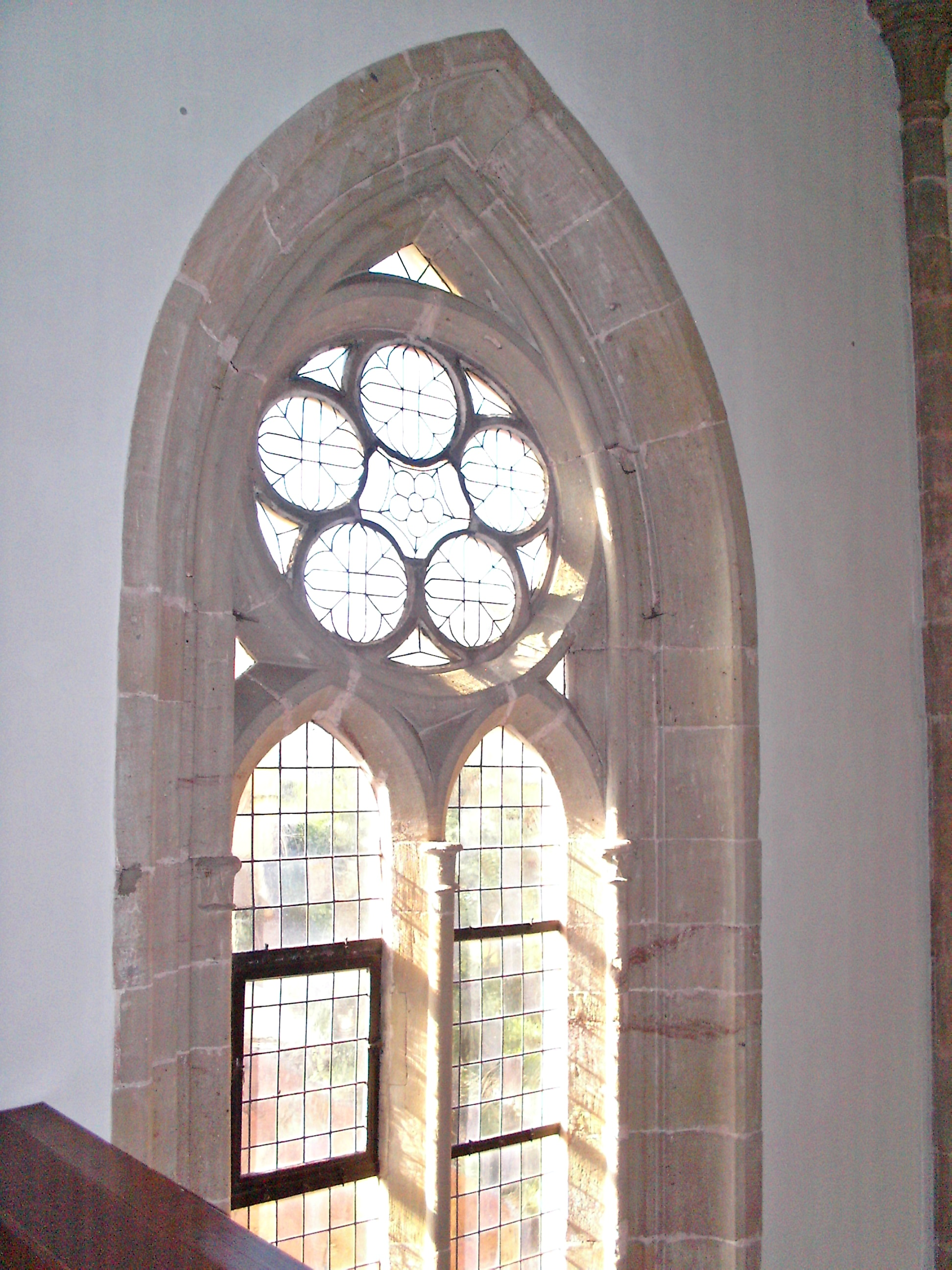 Gotisches Maßwerkfenster, Prot. Kirche Marienthal (Pfalz)